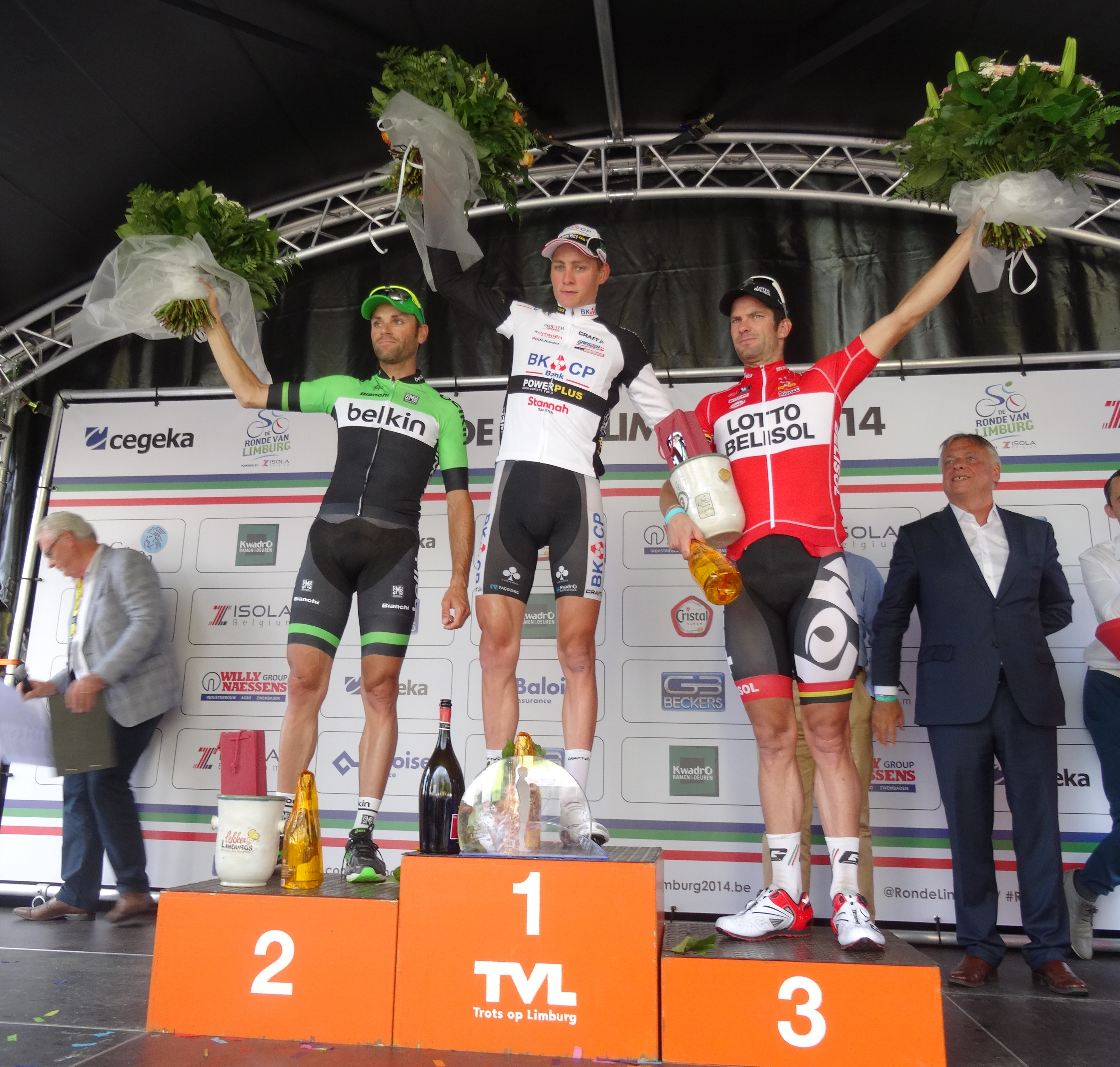 Reportage photographique réalisé le dimanche 15 juin à l'occasion du départ et de l'arrivée du Tour du Limbourg 2014 à Tongres, Belgique.